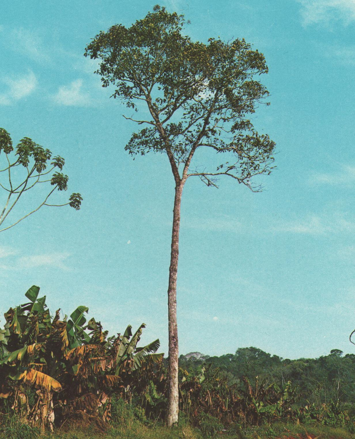 Ejemplar de Cordia trichotoma en Argentina.